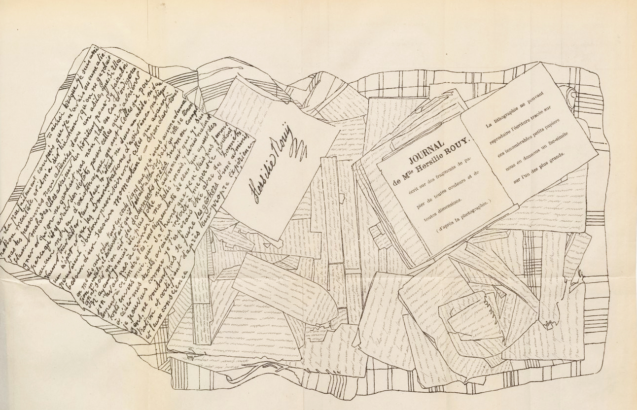 Fac simile d'après photographie des mémoires d'Hersilie Rouy (1814-1881)